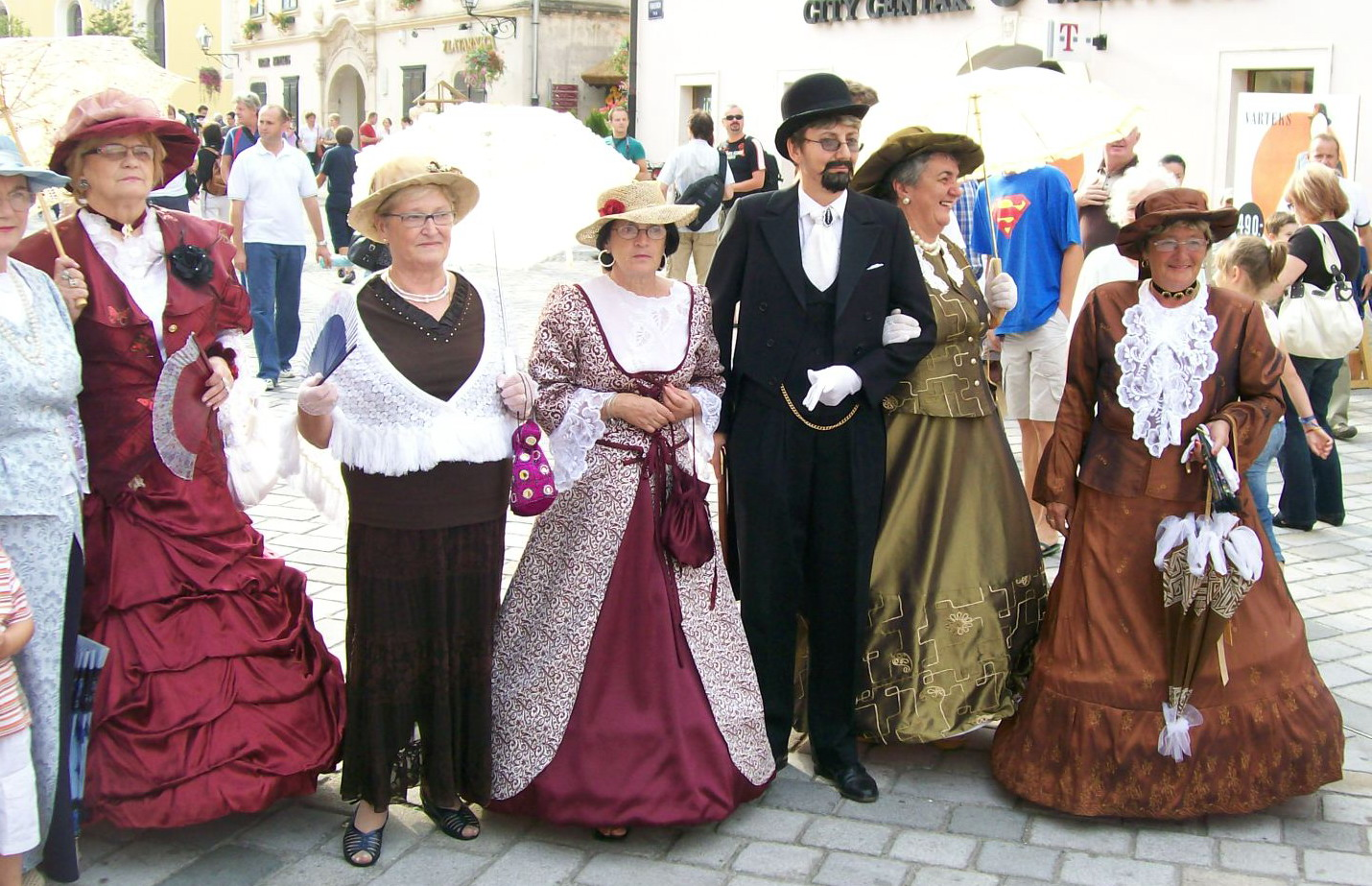 Špancirfest 2008., Varaždin